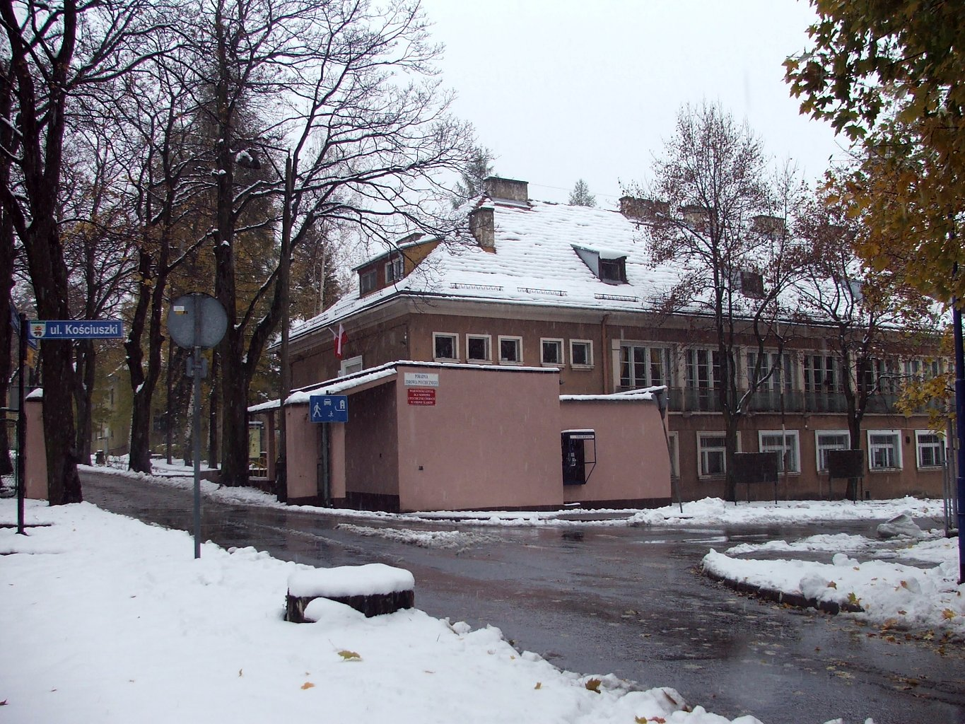 Wojewódzki Szpital dla Nerwowo i Psychicznie Chorych w Stroniu Śląskim (powiat kłodzki). Brama główna szpitala